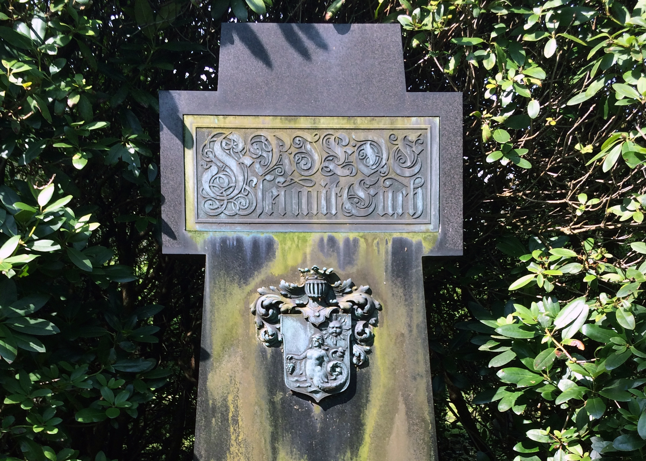 Familiengrab Meerwein, Inschrift "Friede sei mit Euch". Der Familienname ist im Wappen dargestellt: Eine Meerjungfrau hält eine Weintraube. Grabanlage von vier befreundeten Familien. 1888 erwarben die Familien Laeisz, Canel, Hanssen und Meerwein diese Anlage.